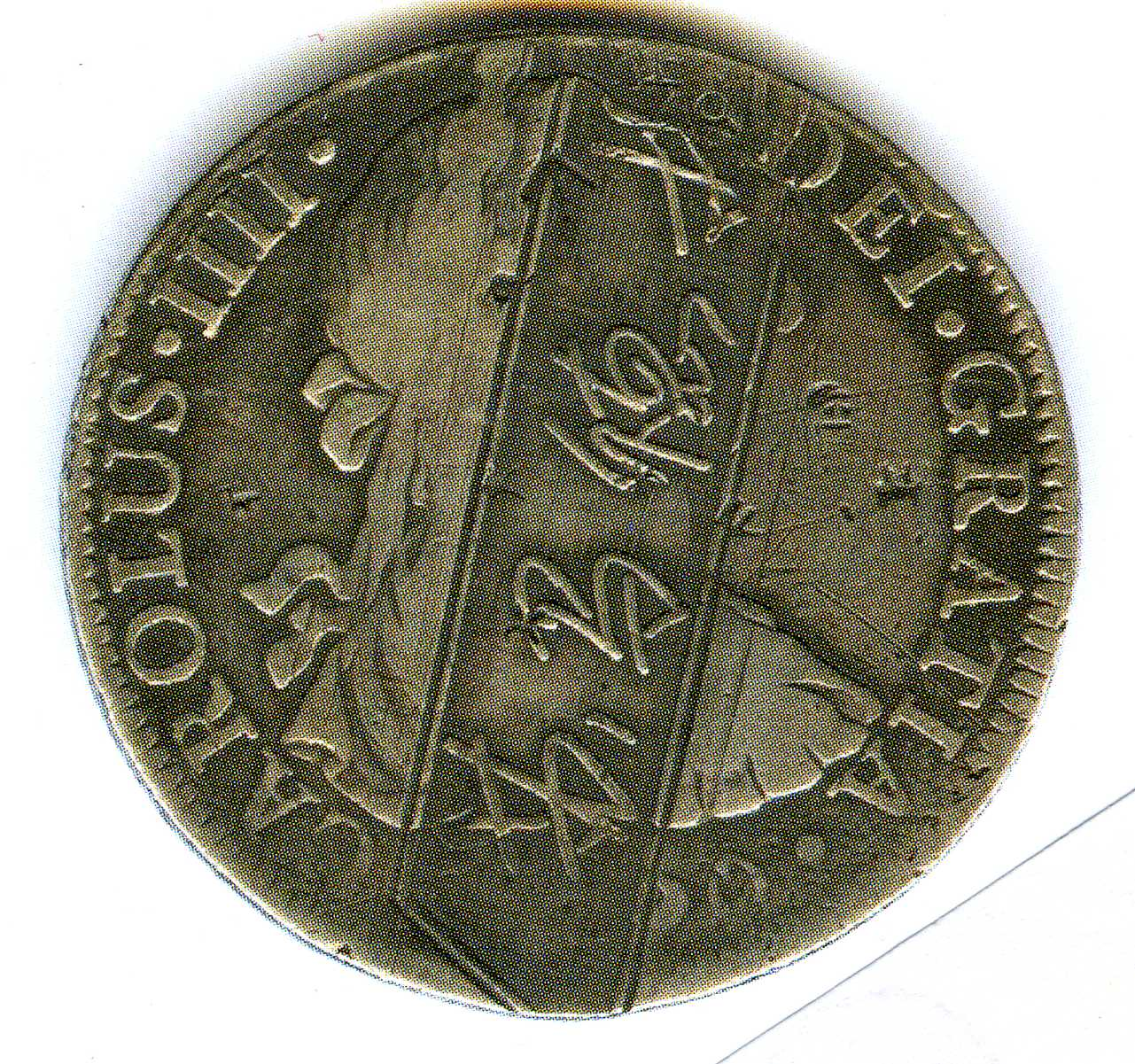 Moneda de Carlos IV con inscripción en chino.